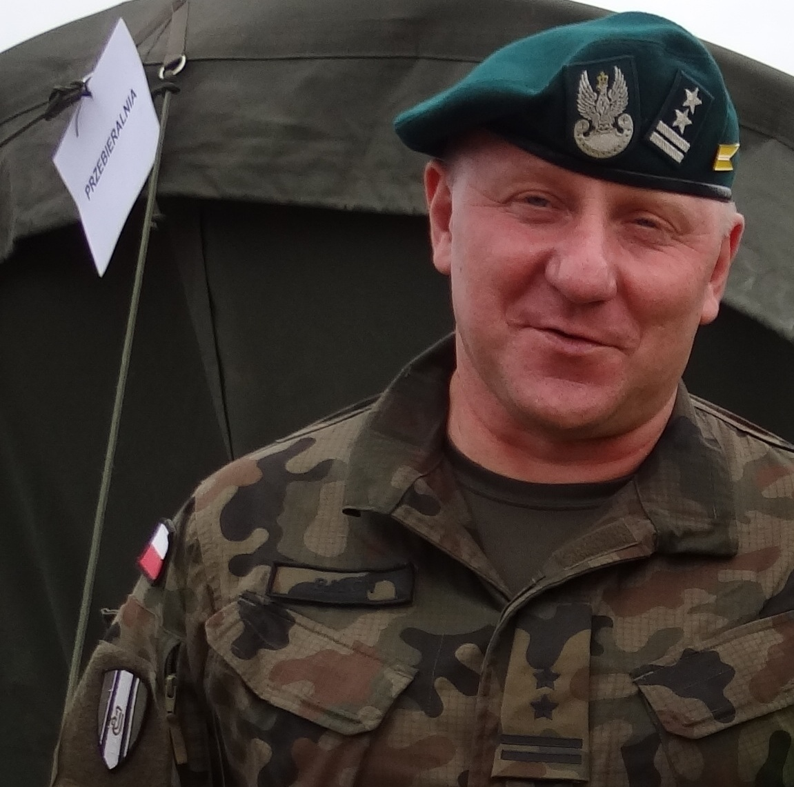 Dowódca 2bpzmot ppłk Piotr Balon